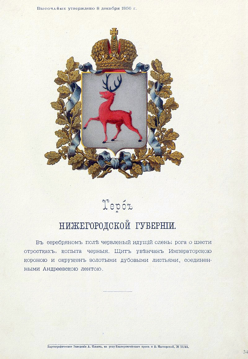 Official Russian Empire coat of arms Nizhny Novgorog Governorate. Герб Российской Империи Нижегородской губернии с официальным описанием в Гербовнике Бенке. Утверждён Императором Всероссийским Александром Вторым в 1878 году.